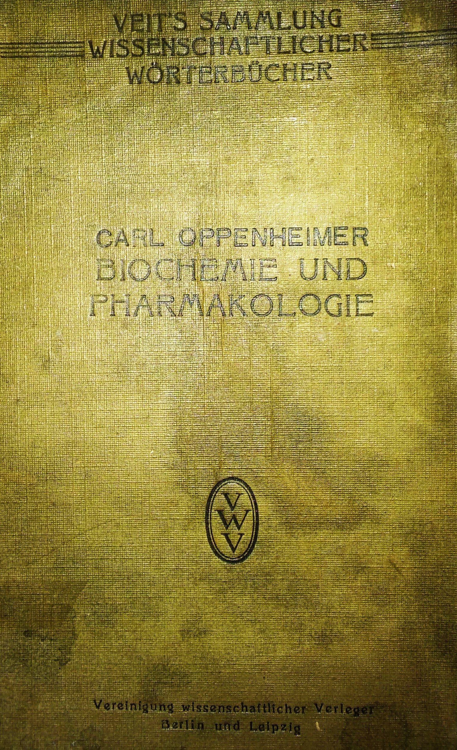 Carl Oppenheimer: Biochemie und Pharmakologie, 1920-as évek